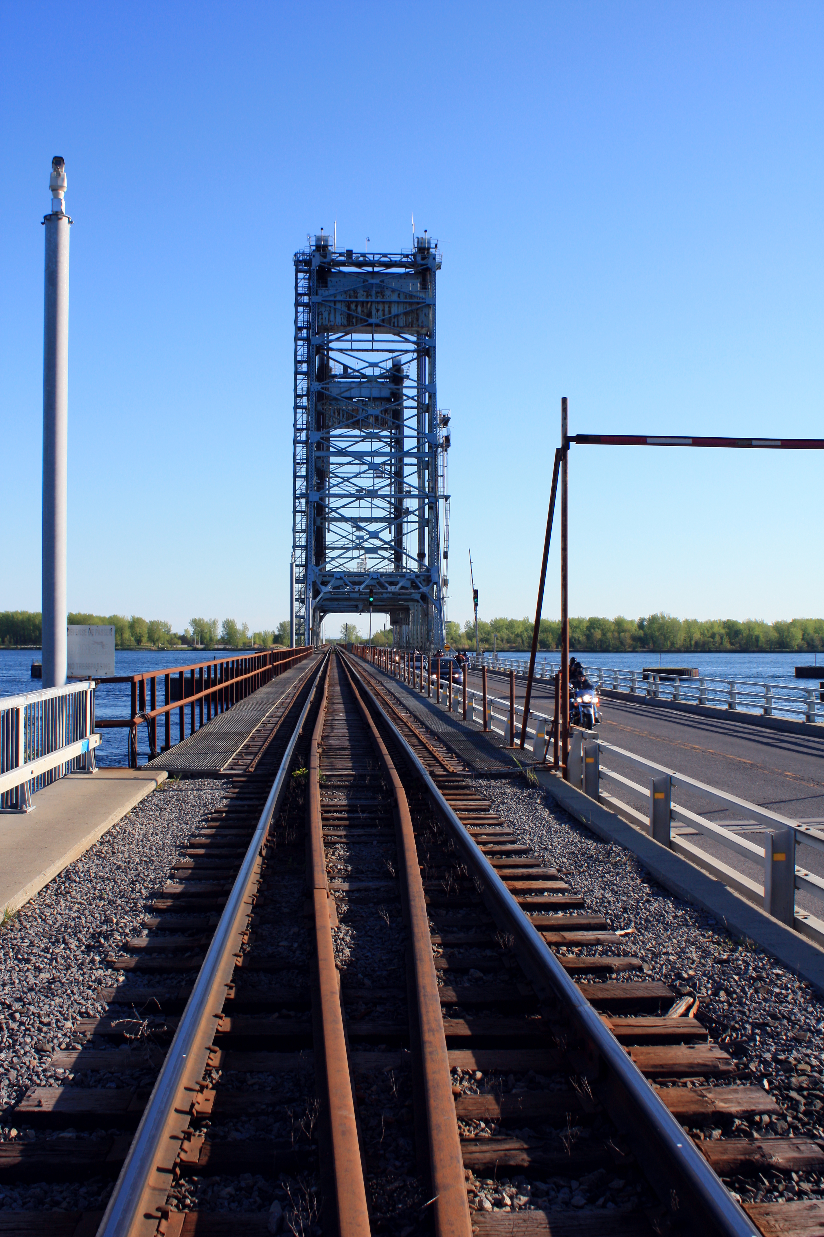 Valleyfield/Laroque bridge, Quebec